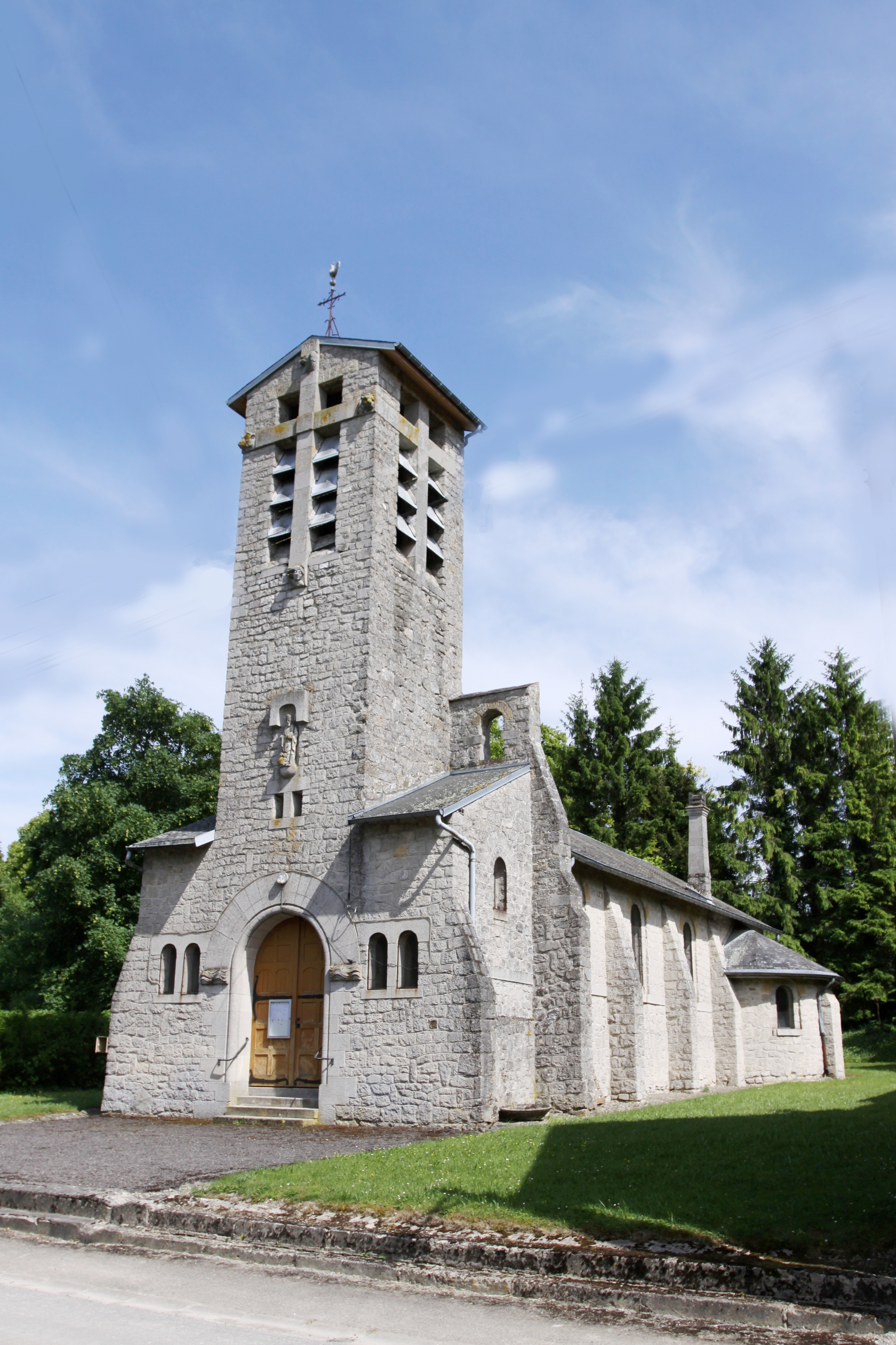 Village Ardennais